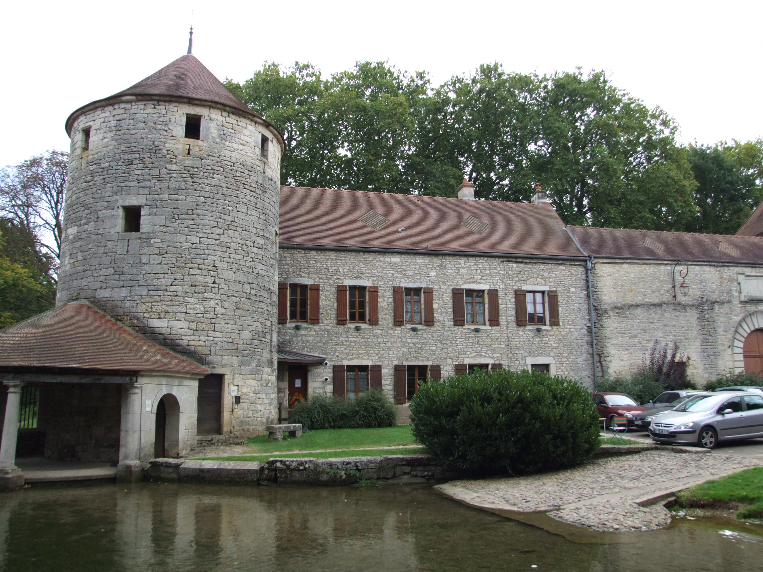 Bèze, Côte d'Or, Bourgogne, FRANCE